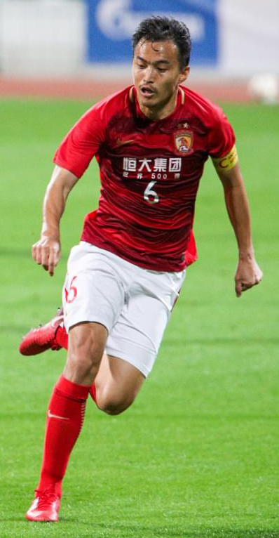 28.01.2018. Объединенные Арабские Эмираты, Дубай, «Мактум ибн Рашид Аль-Мактум». «Газпром»-тренировочные сборы в Дубае: товарищеский матч «Зенит» — «Гуанчжоу Эвергранд».